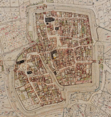 Kartenausschnitt Urkataster Bayern, Altstadt Iphofen